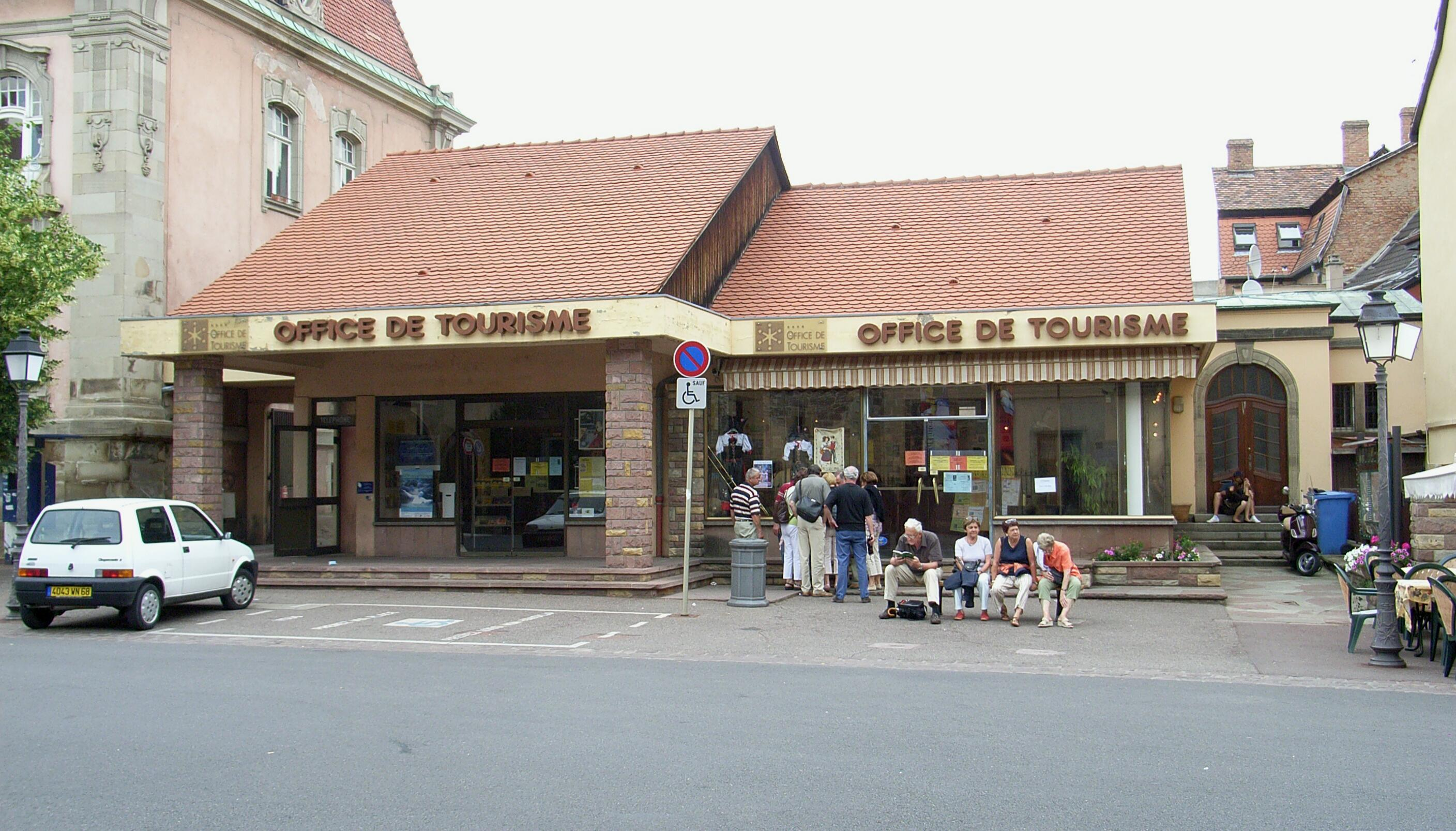 Dieses Bild zeigt das "Office de Tourisme" in Colmar.